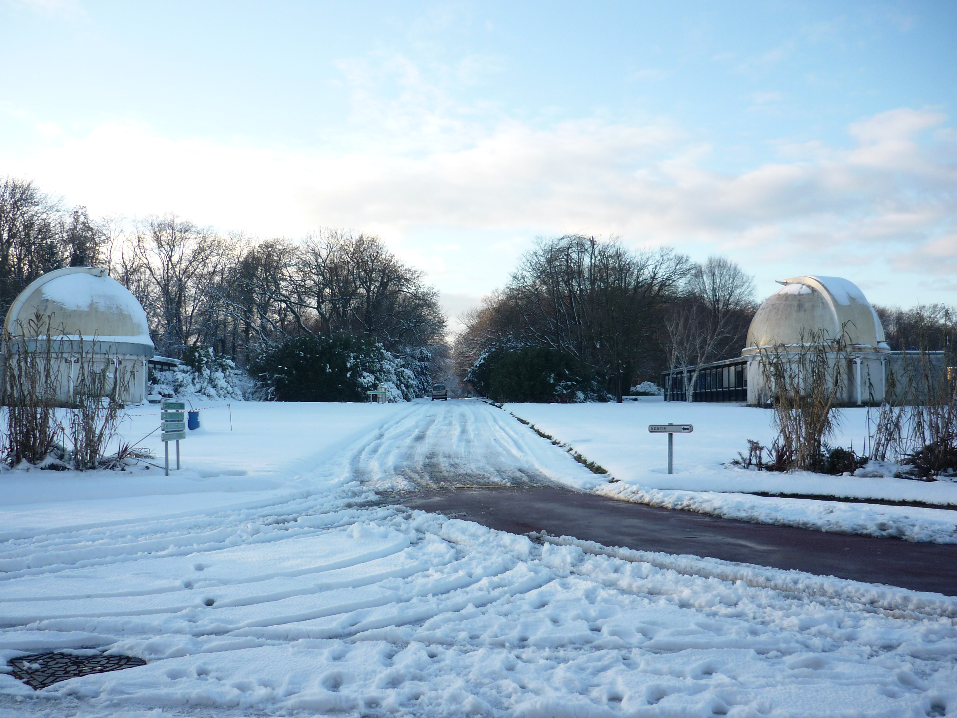 Observatoire de Meudon. A gauche, coupole du télescope de 1m de diamètre, à droite, coupole du 32 cm de diamètre (opérant en infrarouge)